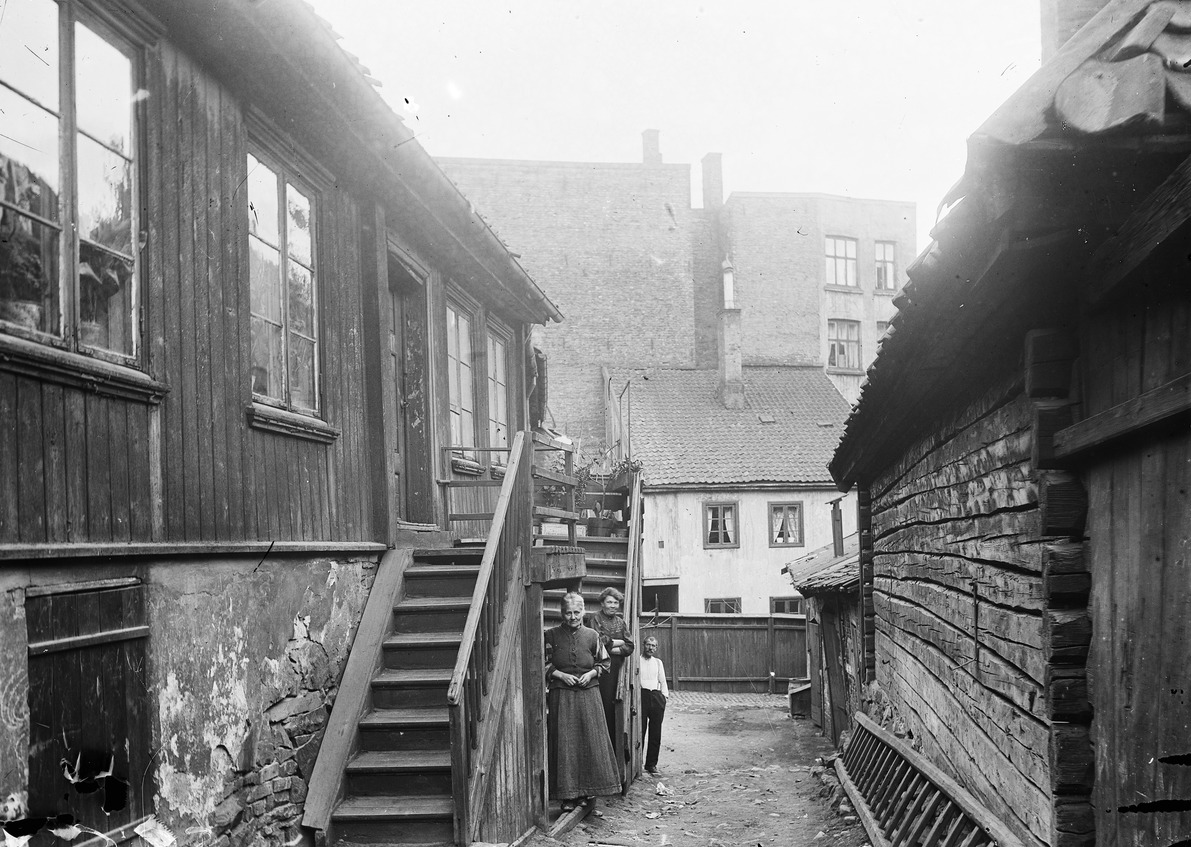 Snekkergangen på Hammersborg fotografert ca. 1915 av Johannes Holmsen